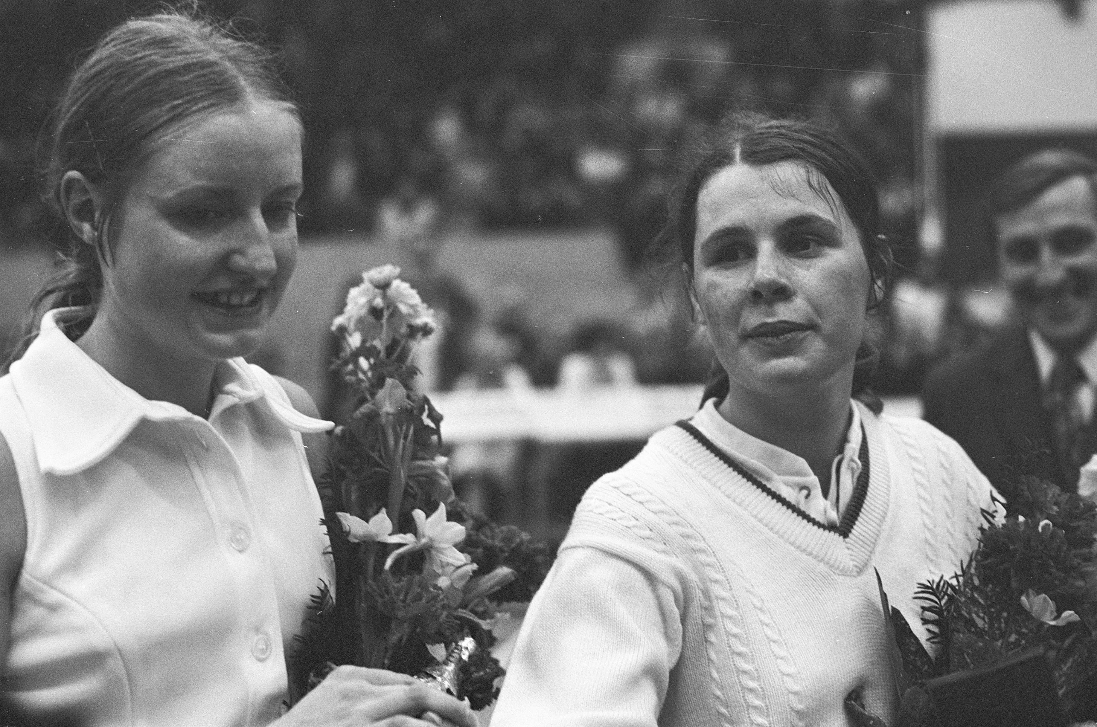 Internationale kampioenschappen Badminton te Beverwijk, Gillian Gilks (links) en Joke van Beusekom